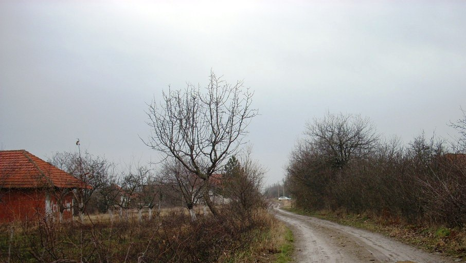 Dubrava, Bojnik